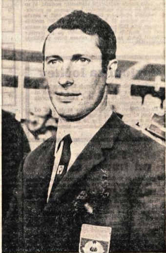 Janez Brodnik